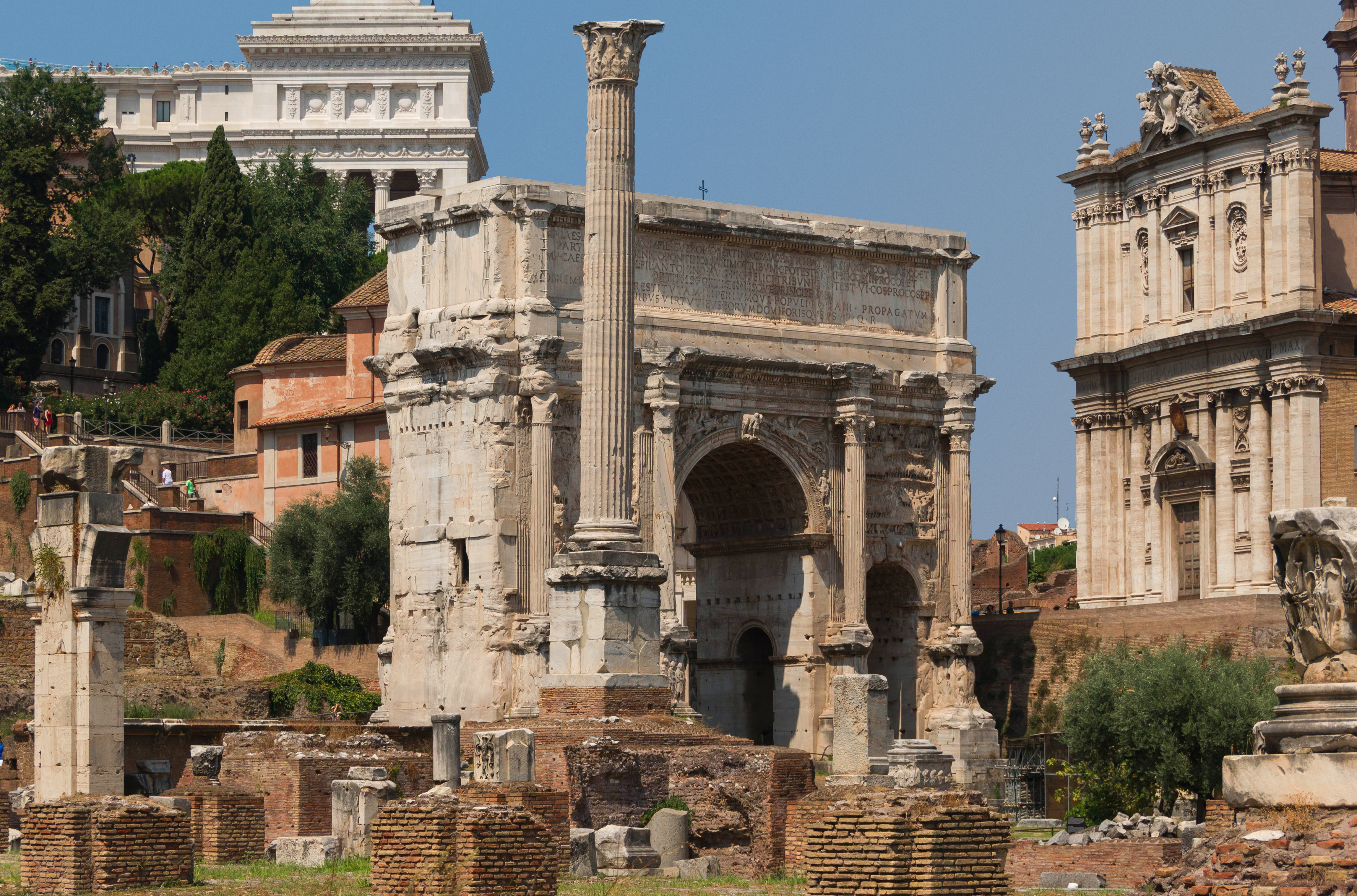 L'Arc de Septime Sévère. Au premier plan, la Colonne de Phocas, en arrière-plan, le Vittoriano, à droite, la façade de l'église des Saints Lucs et Martine. Forum Romanum, Rome, Italie.